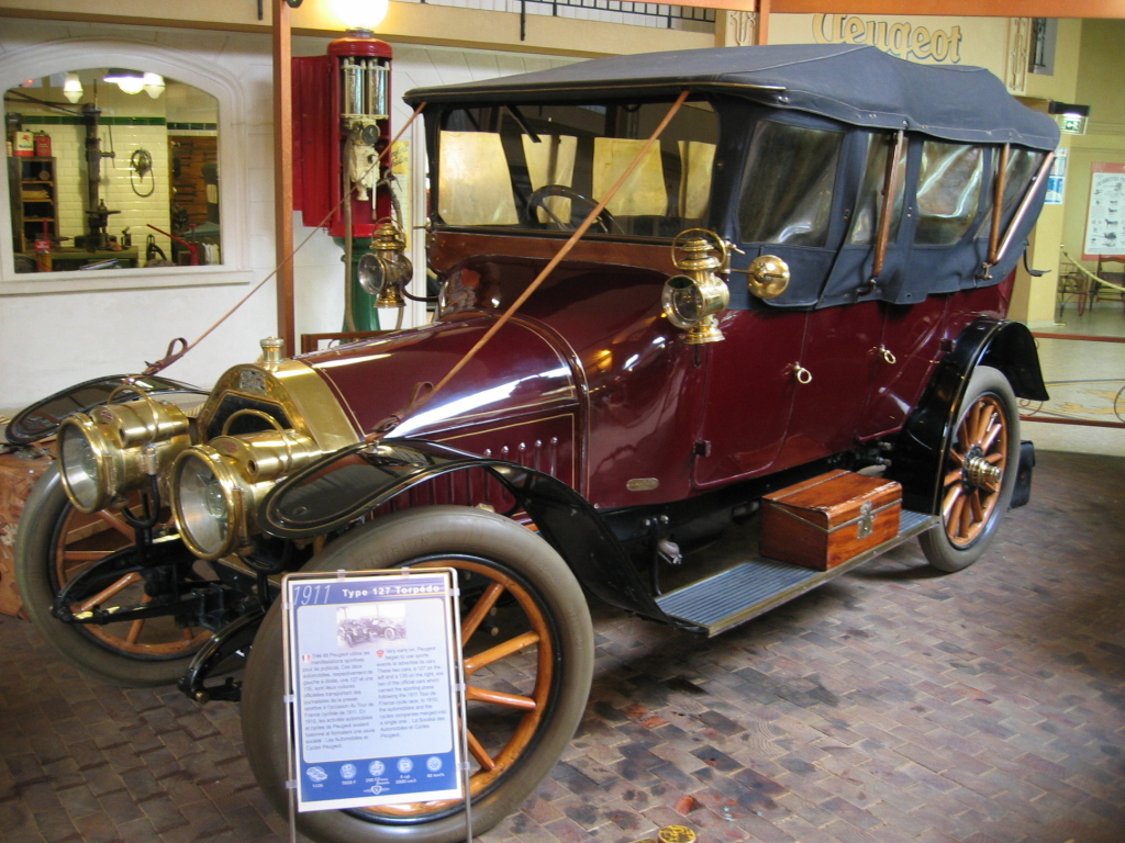 Peugeot 127 - Musée Peugeot Sochaux